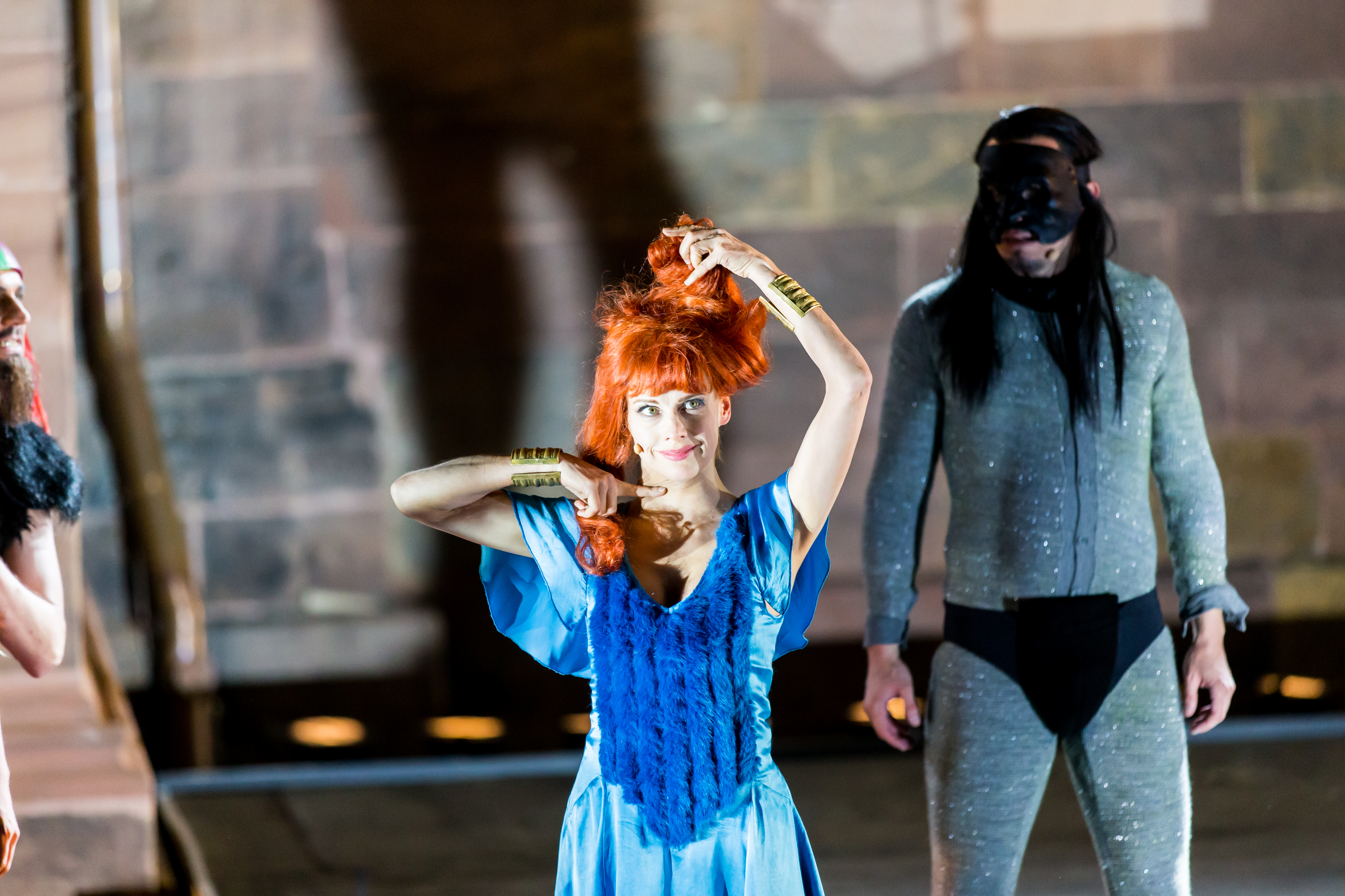 Nibelungenfestspiele Worms Gemetzel 2015 Nordseite Wormser Kaiserdom Nico Hofmann (Intendant), Albert Ostermaier (Autor), Thomas Schadt (Regisseuer) Enemble: Alina Levshin (Ortlieb), Maik Solbach (Narr), Judith Rosmair (Kriemhild), Catrin Striebeck (Brünhild), Markus Boysen (Etzel), Heiko Pinkowski (Dietrich), Max Urlacher (Hagen), Holger Kunkel (Gunter), Gabriel Raab (Gernot), Peter Becker (Giselher), Tom Radisch (Volker), Marion Breckwoldt (Zofe), Radu Cojocariu (Erzähler)